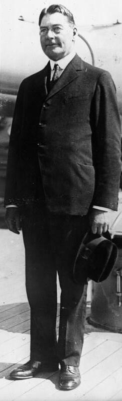 Curtis Wilbur Marine Minister